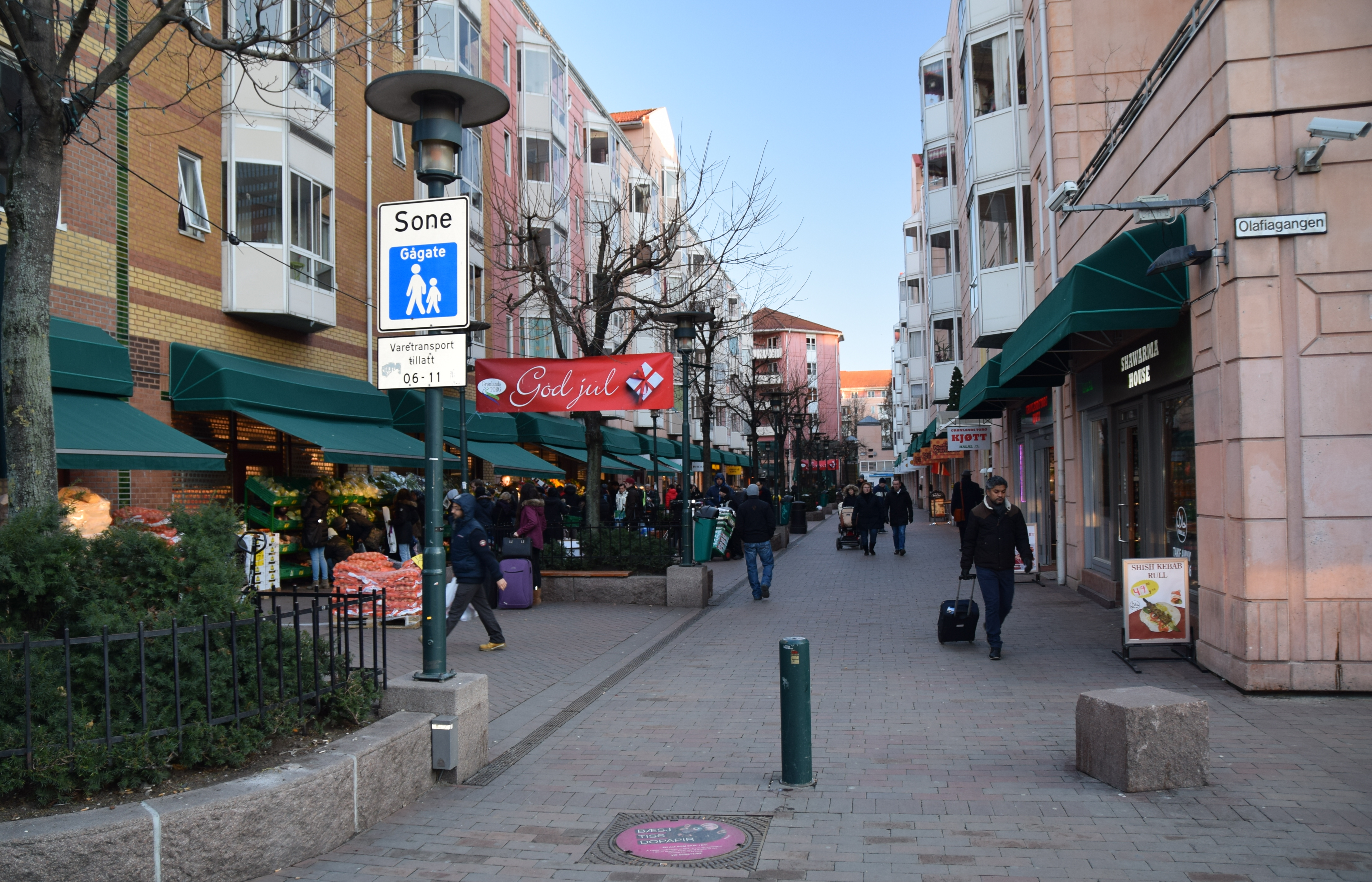 Smalganfgen, Grønland, Oslo, sett fra Olafiagangen mot øst